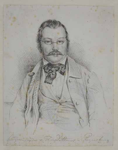 Der Regensburger Bürgermeister und königlich bayerische Minister Freiherr Gottlieb von Thon-Dittmer (1802-1853).